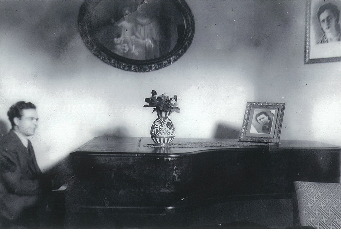 Foto te ndryshme nga jeta e Panajot Kanaçit